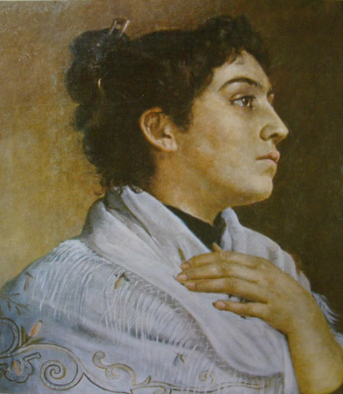 Retrato